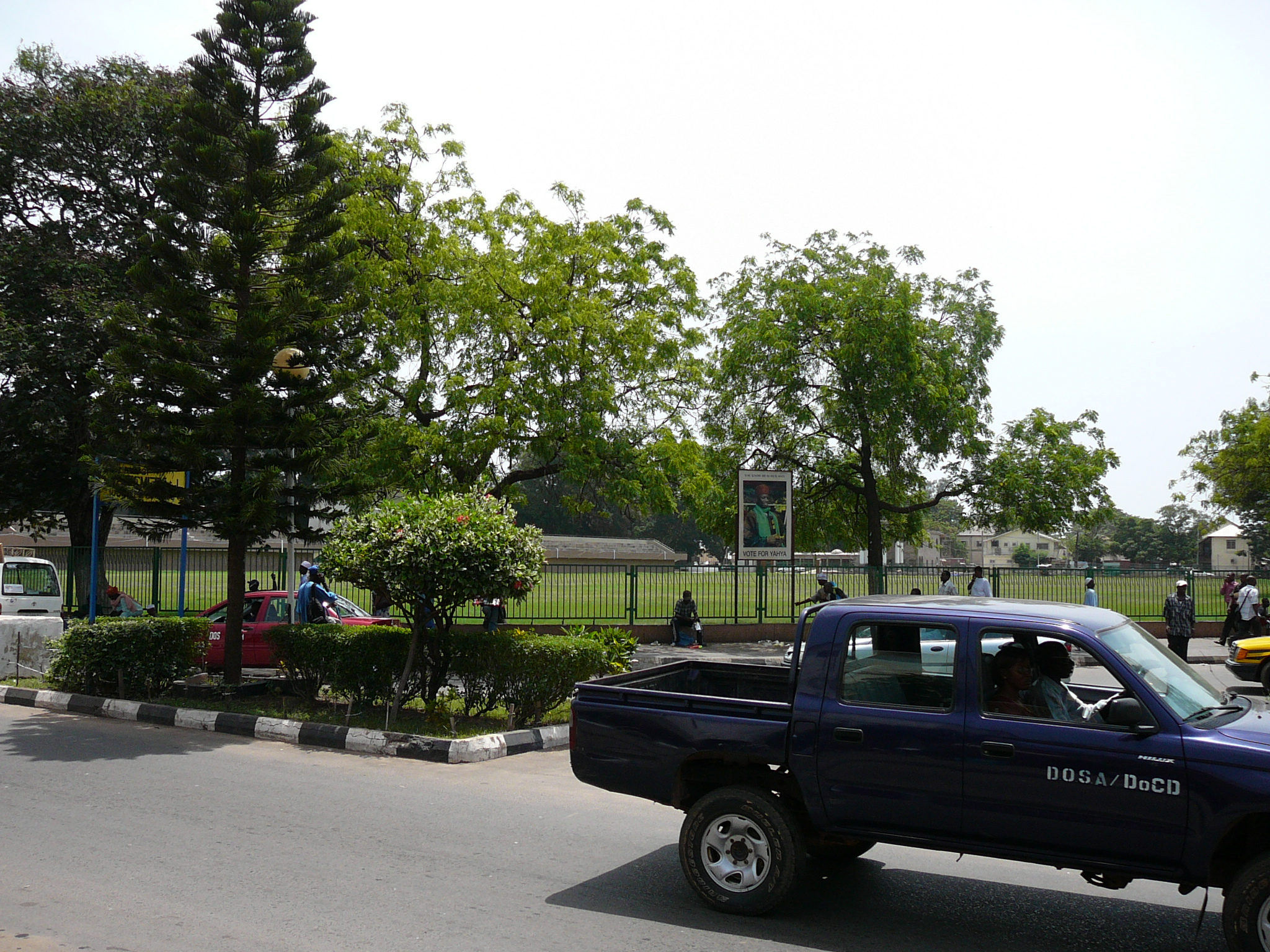 Straße in Banjul